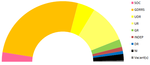 Répartition des sénateurs suivant leur groupe parlementaire après les élections sénatoriales de 1932.